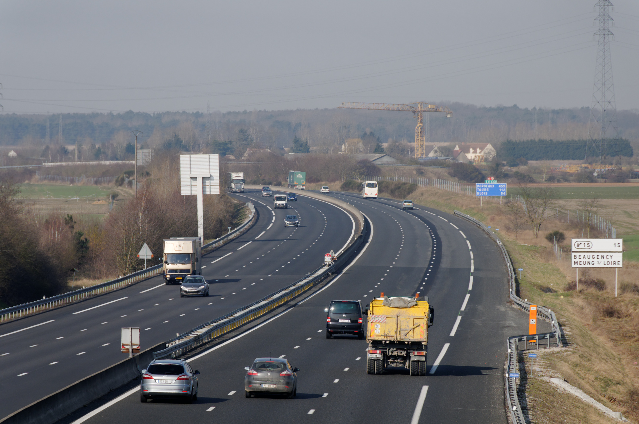 Autoroute A10 (km 100) à l'ouest d'Orléans, Loiret, France